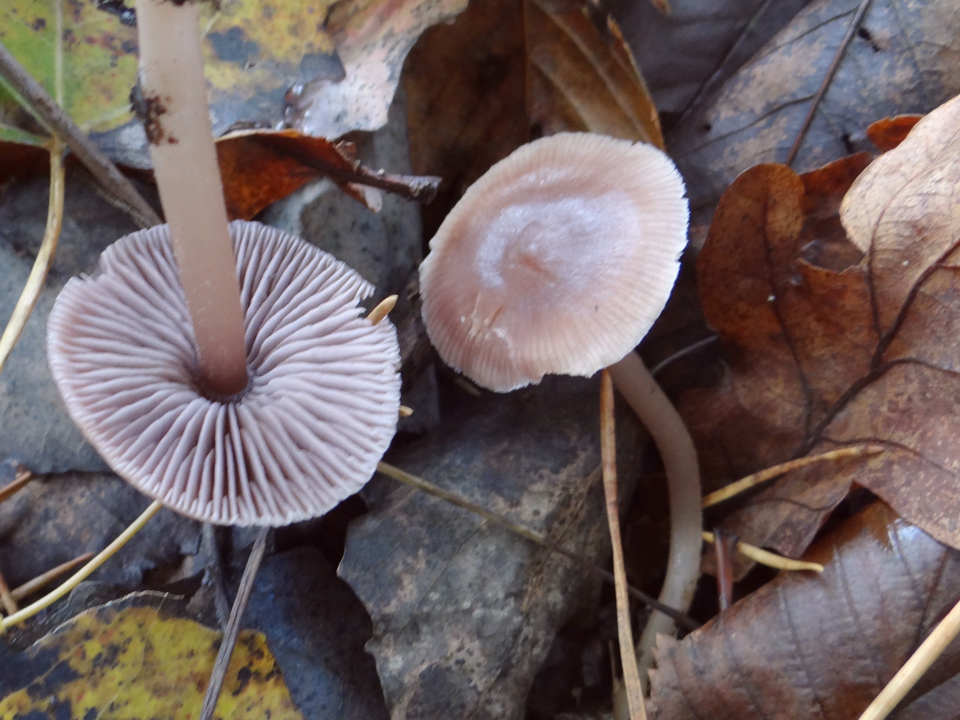 Mycena rosea (location: Poland, Pogórze Wiśnickie, Rajbrot)